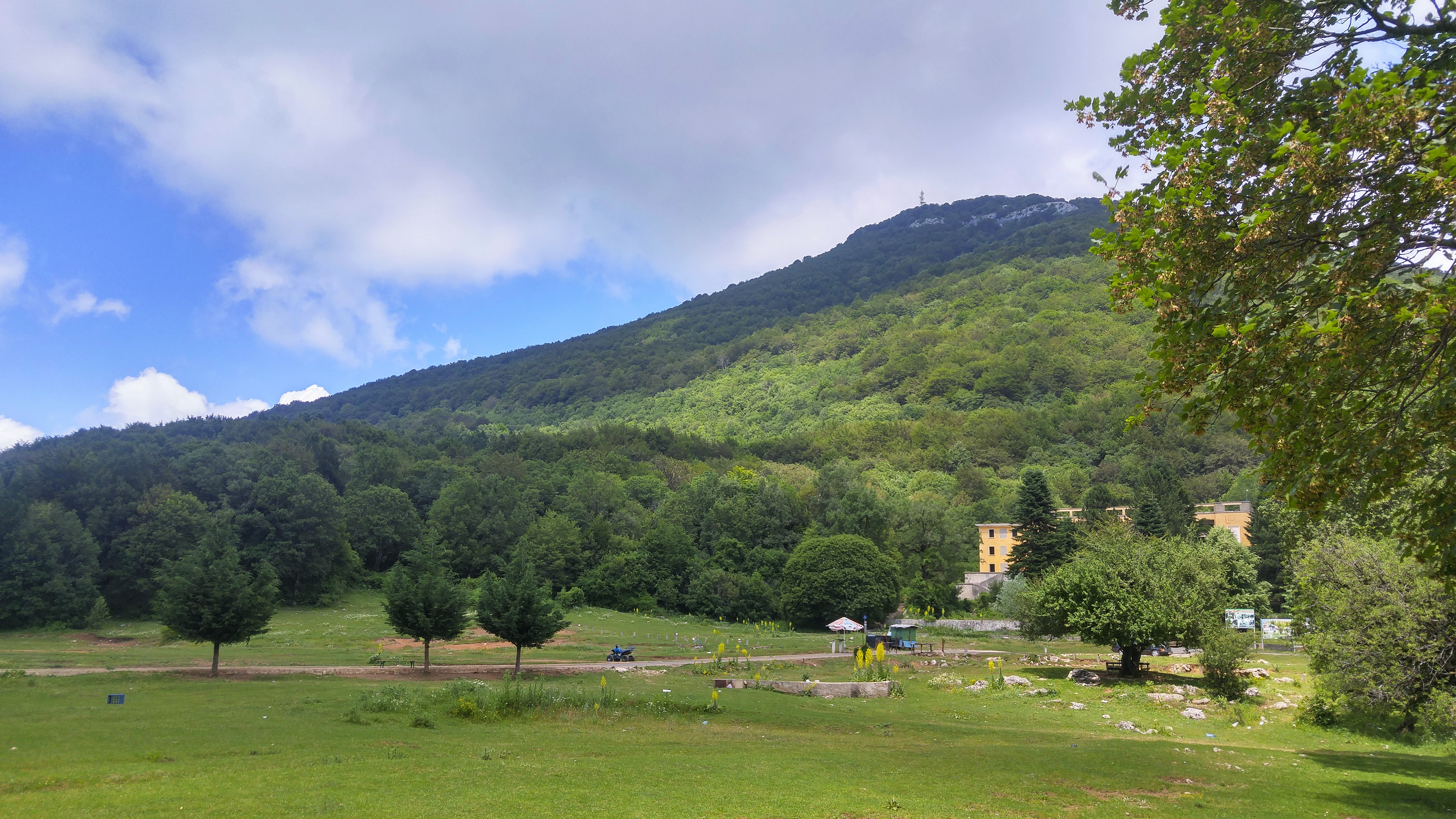 Mali i Dajtit, Tirane, Kruje